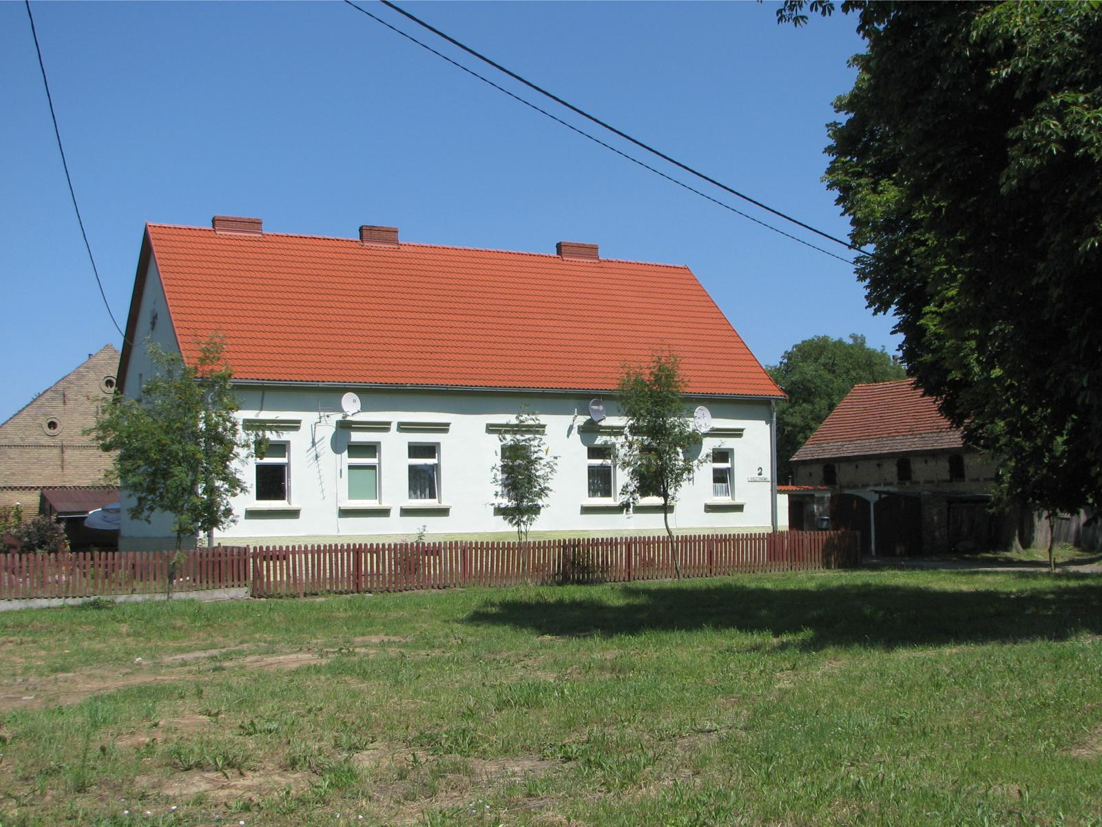 Wojcieszyce. Dom przy ul. Parkowej.